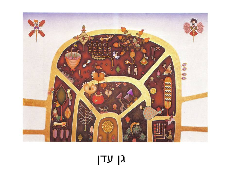 גן עדן